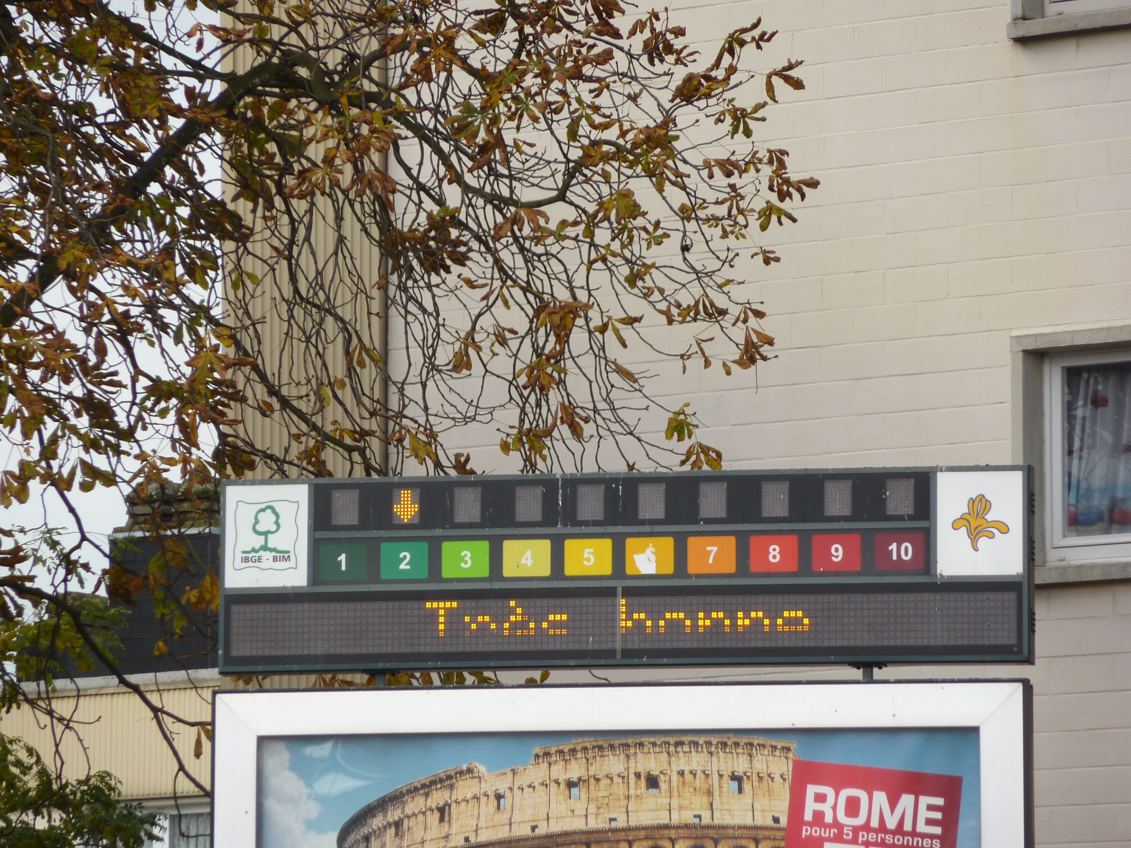 Indice de la qualité de l'air à Evere (Bruxelles), chaussée de Louvain au tenant de l'avenue de l'Optimisme sur une borne de la Cellule Interrégionale de l'Environnement. Cette borne a été retirée en 2011.